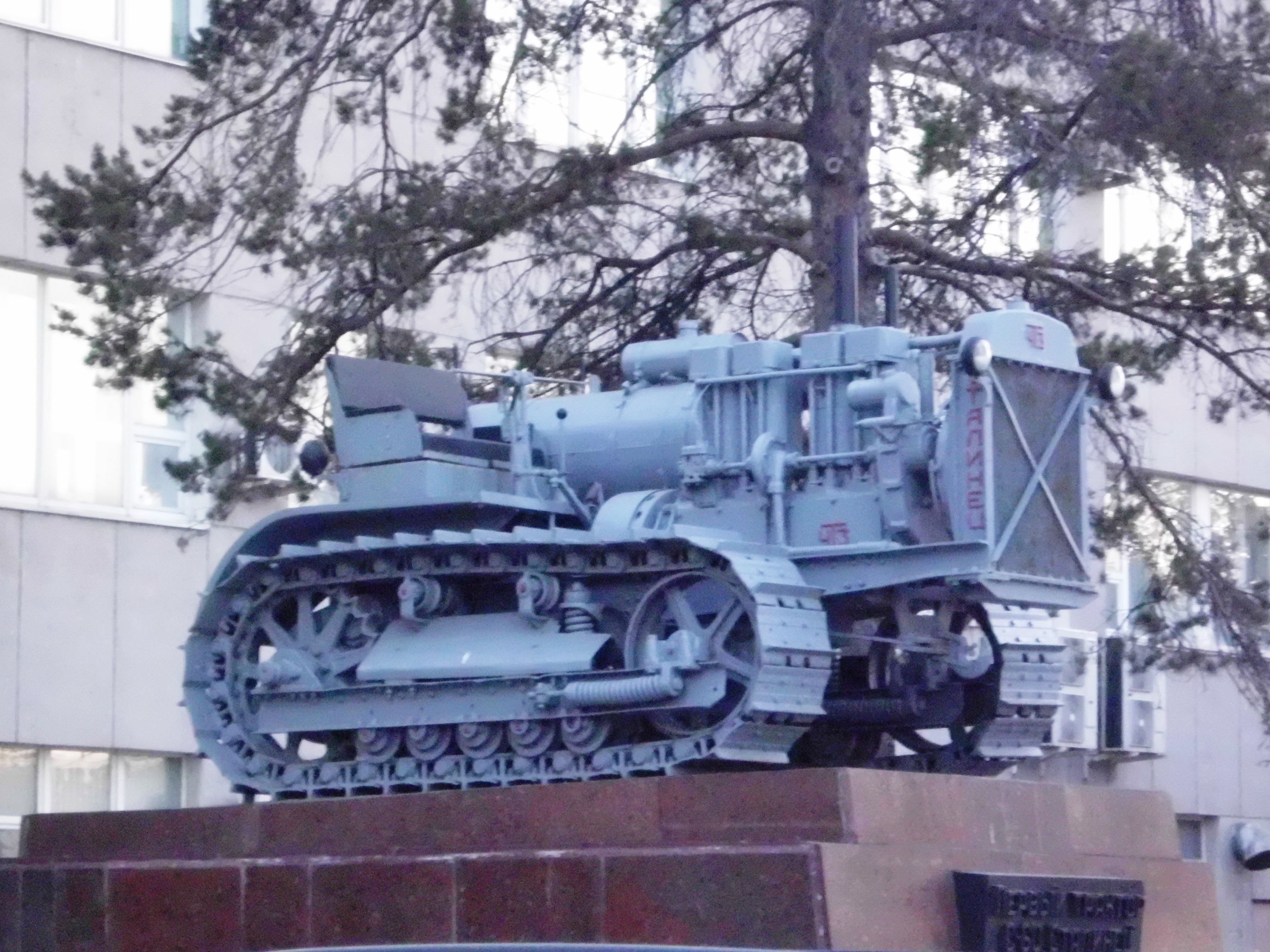 Памятник «Первенец ЧТЗ - трактор С-60»: проспект Ленина, 3 (перед зданием заводоуправления), город Челябинск, Челябинская область.